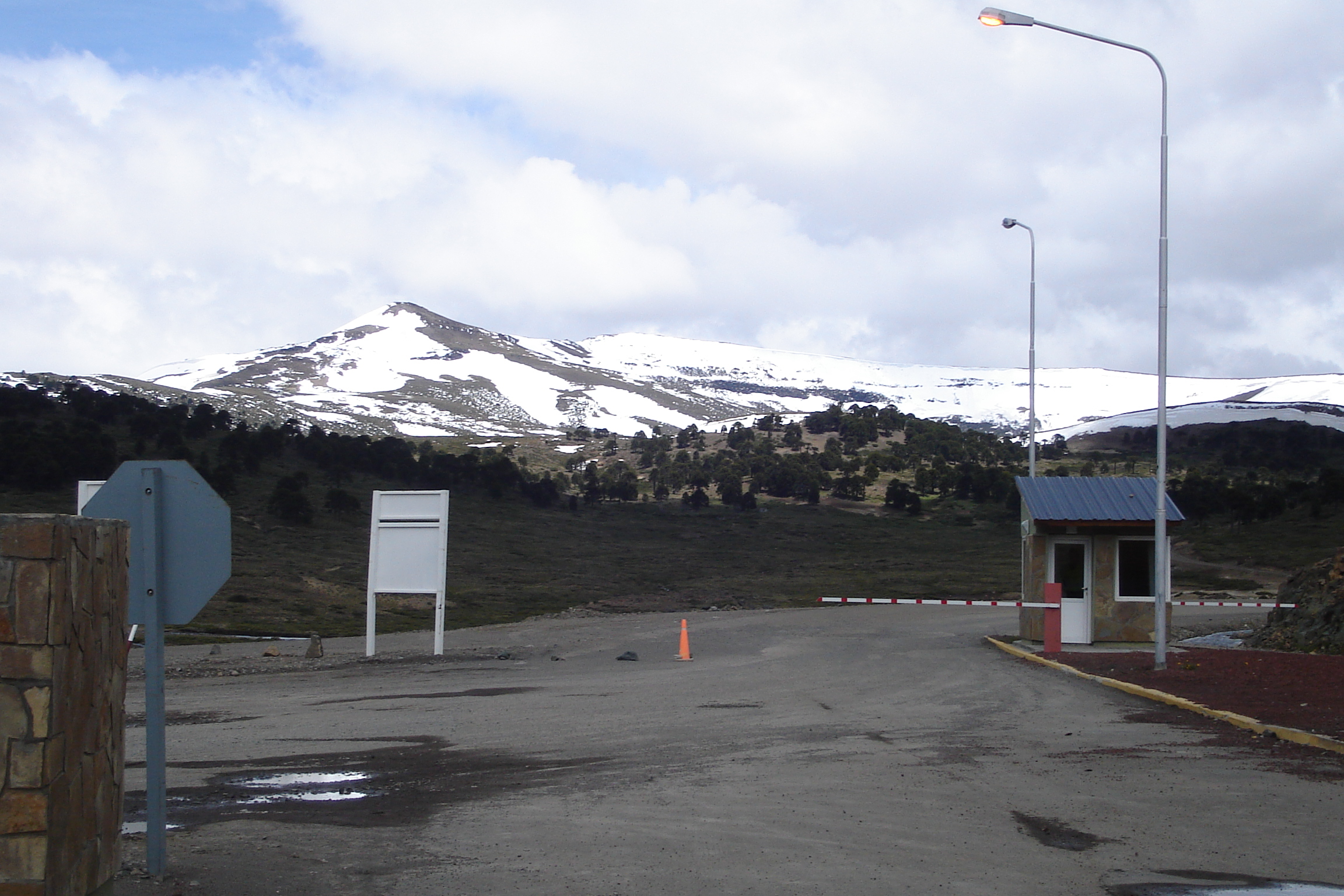 Paso fronterizo de Pino Hachado. Argentina hacia adelante y Chile hacia atrás.